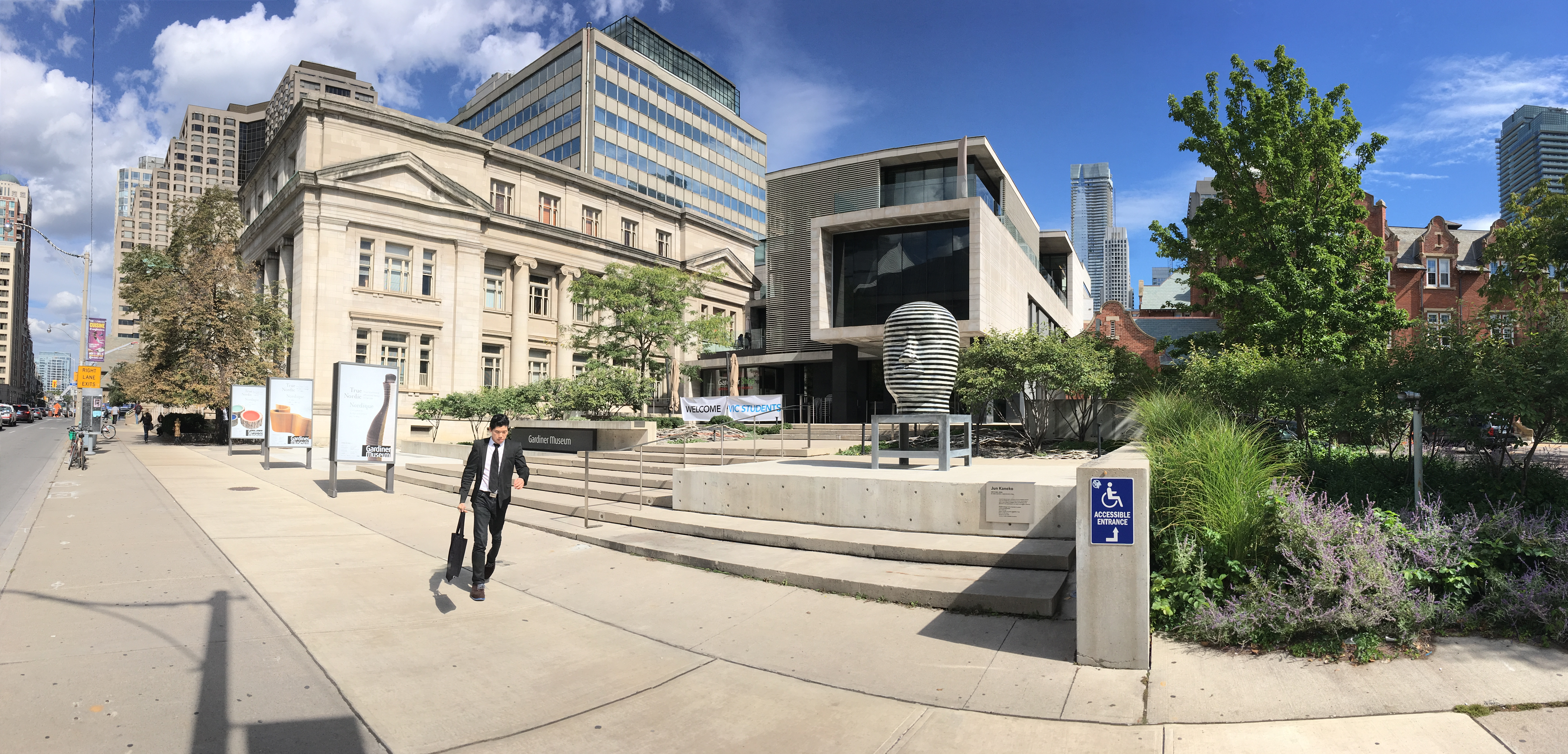 Gardiner Museum, Toronto